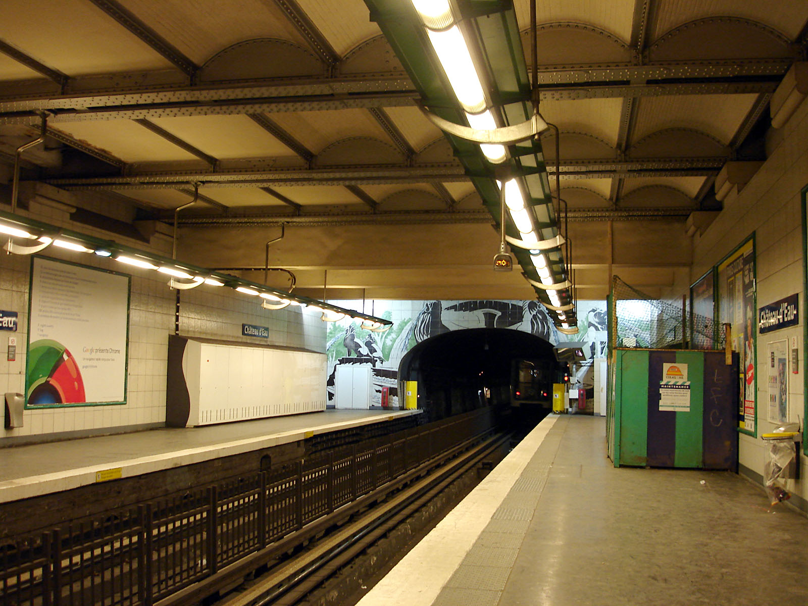 La station Château d'Eau de la ligne 4 du métro de Paris, France